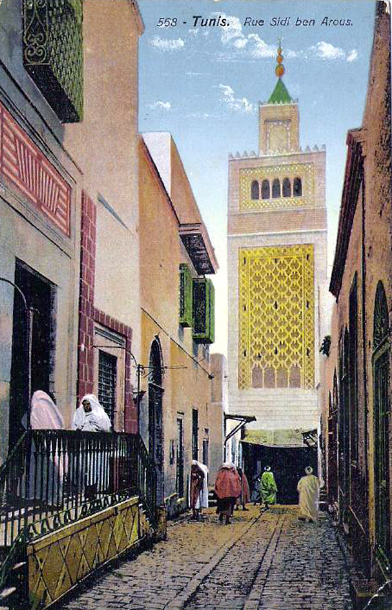 Sidi Ben Arous Street (Medina de Tunis)